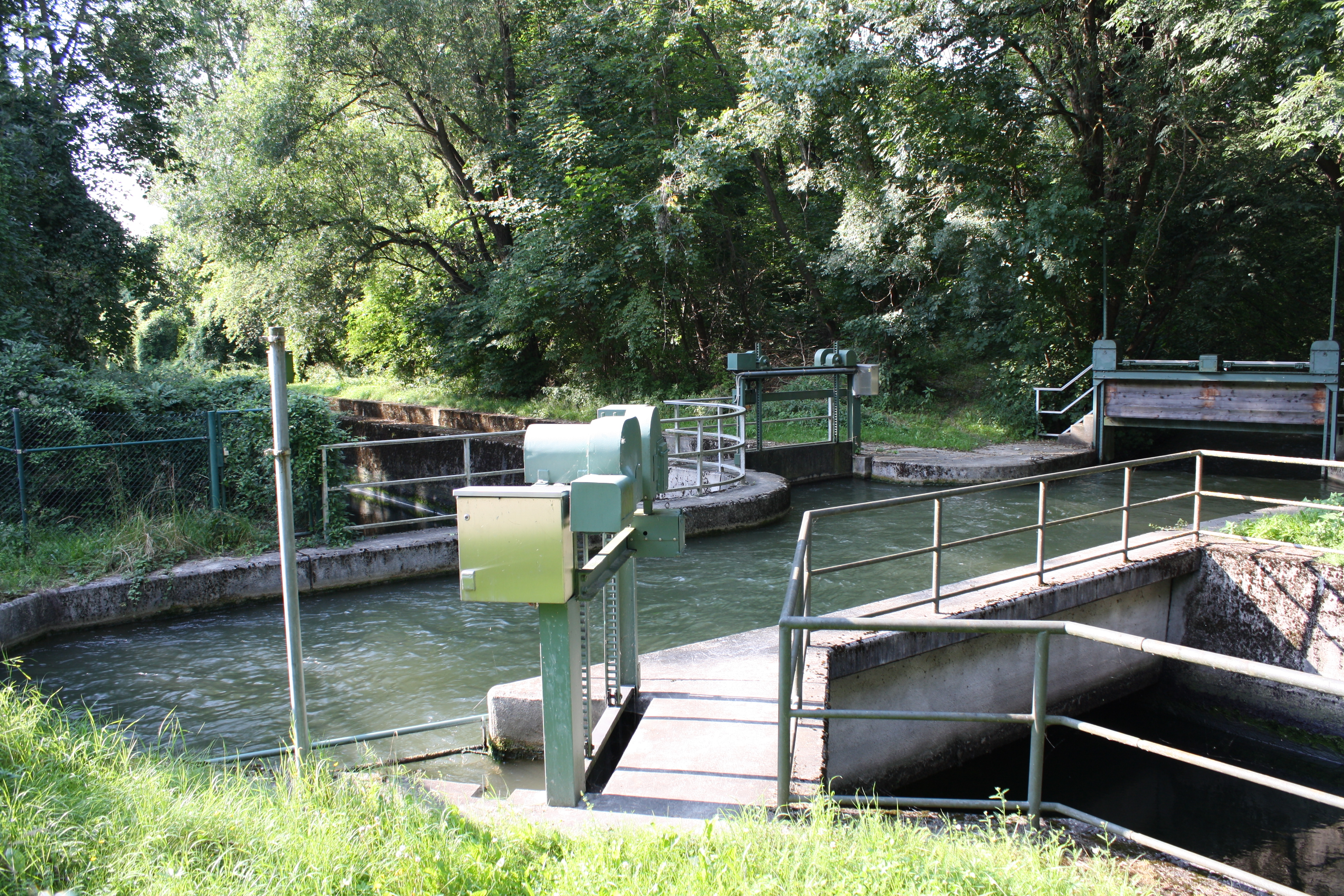 Abfluss des Schleißheimer Kanals und des Unteren Schwabinger Altbachs vom Garchinger Mühlbach bei Großlappen, München